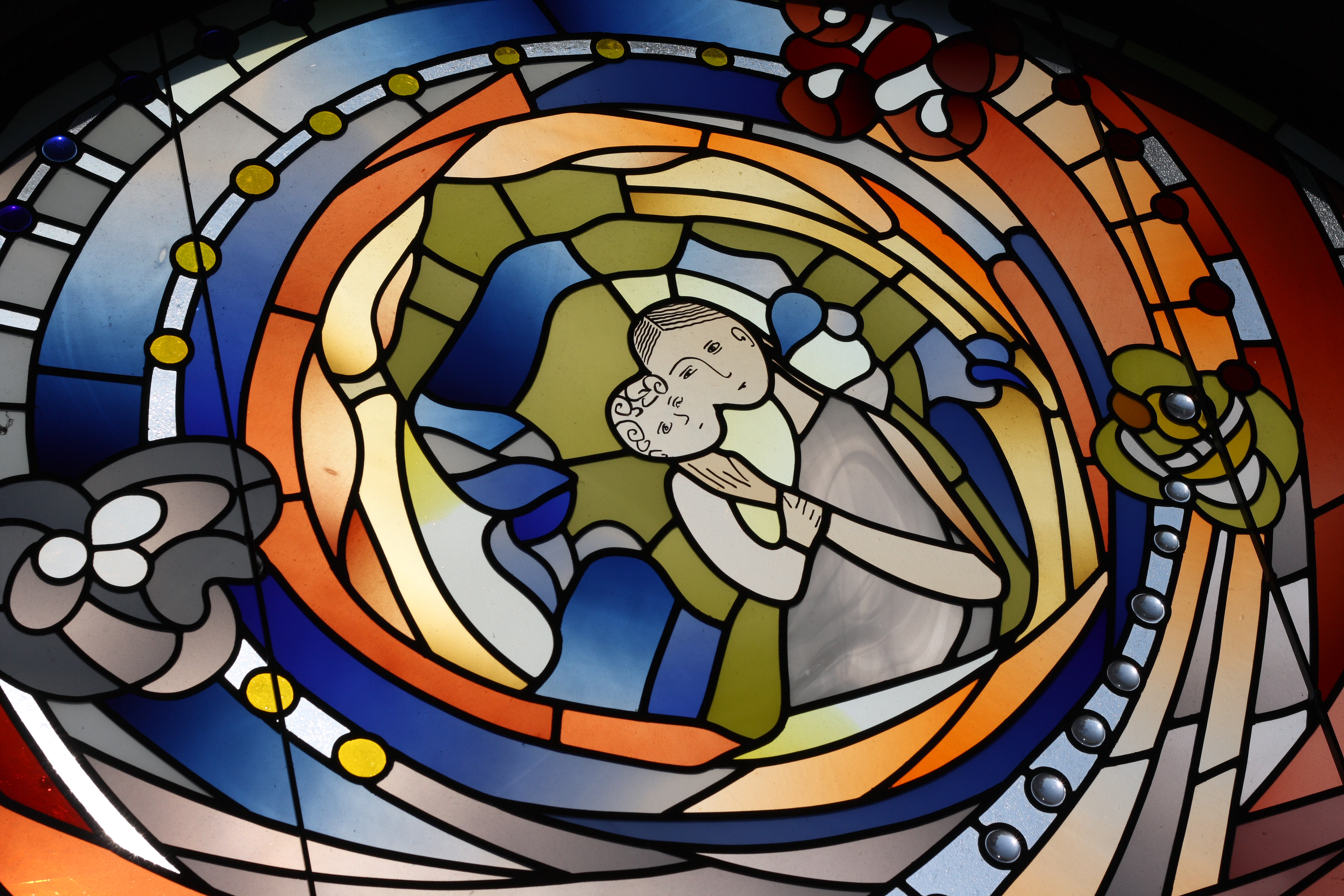 Bleiglasfenster (Ausschnitt) über dem Eingang der katholischen Pfarrkirche St. Severin in Mehlem, einem Ortsteil von Bonn, Darstellung: Maria und Kind, Entwurf: Irene Rothweiler, Ausführung: Glasmalerei Oidtmann in Linnich (2003)